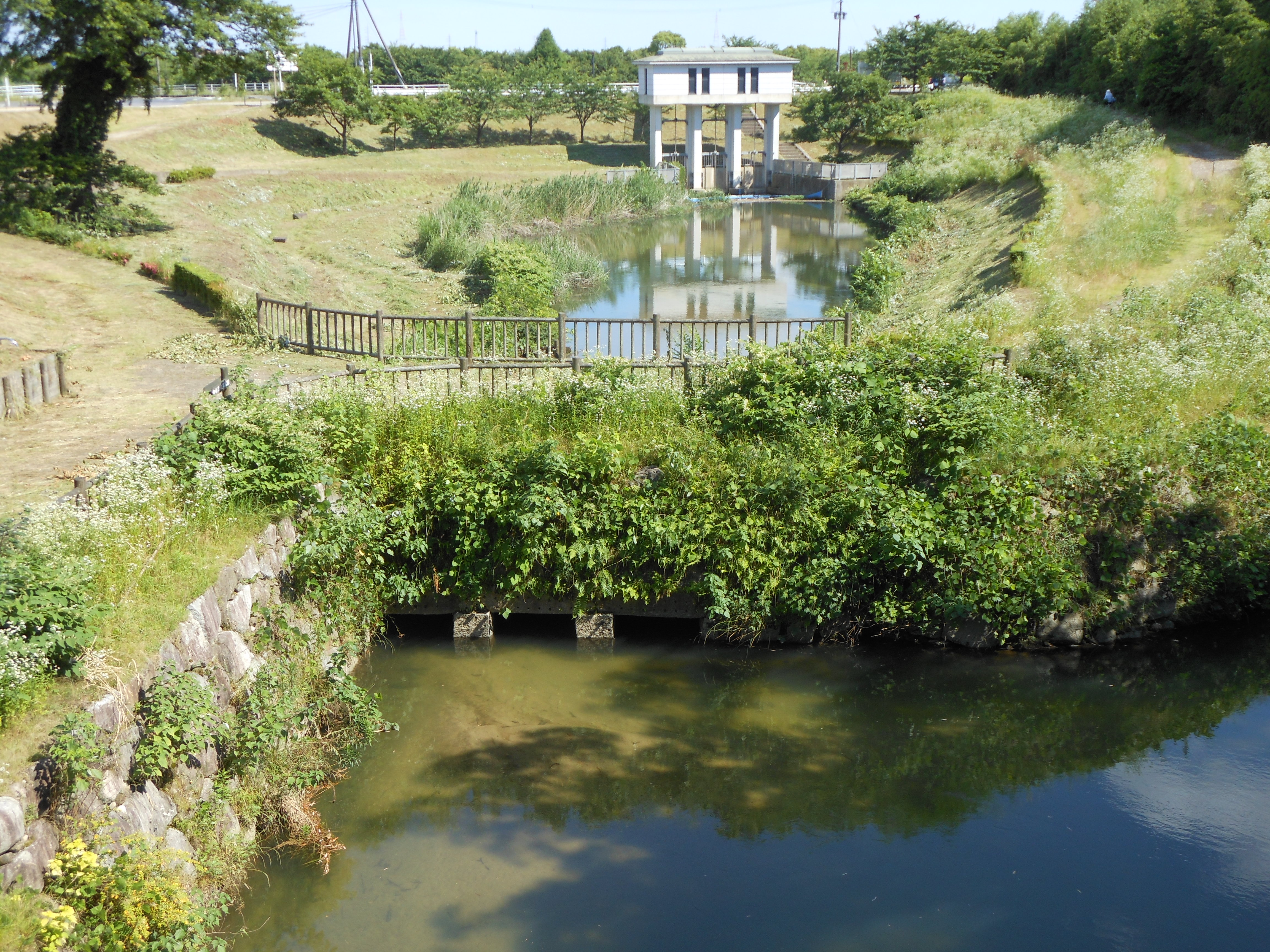 石井樋（嘉瀬川から多布施川への分流施設）。